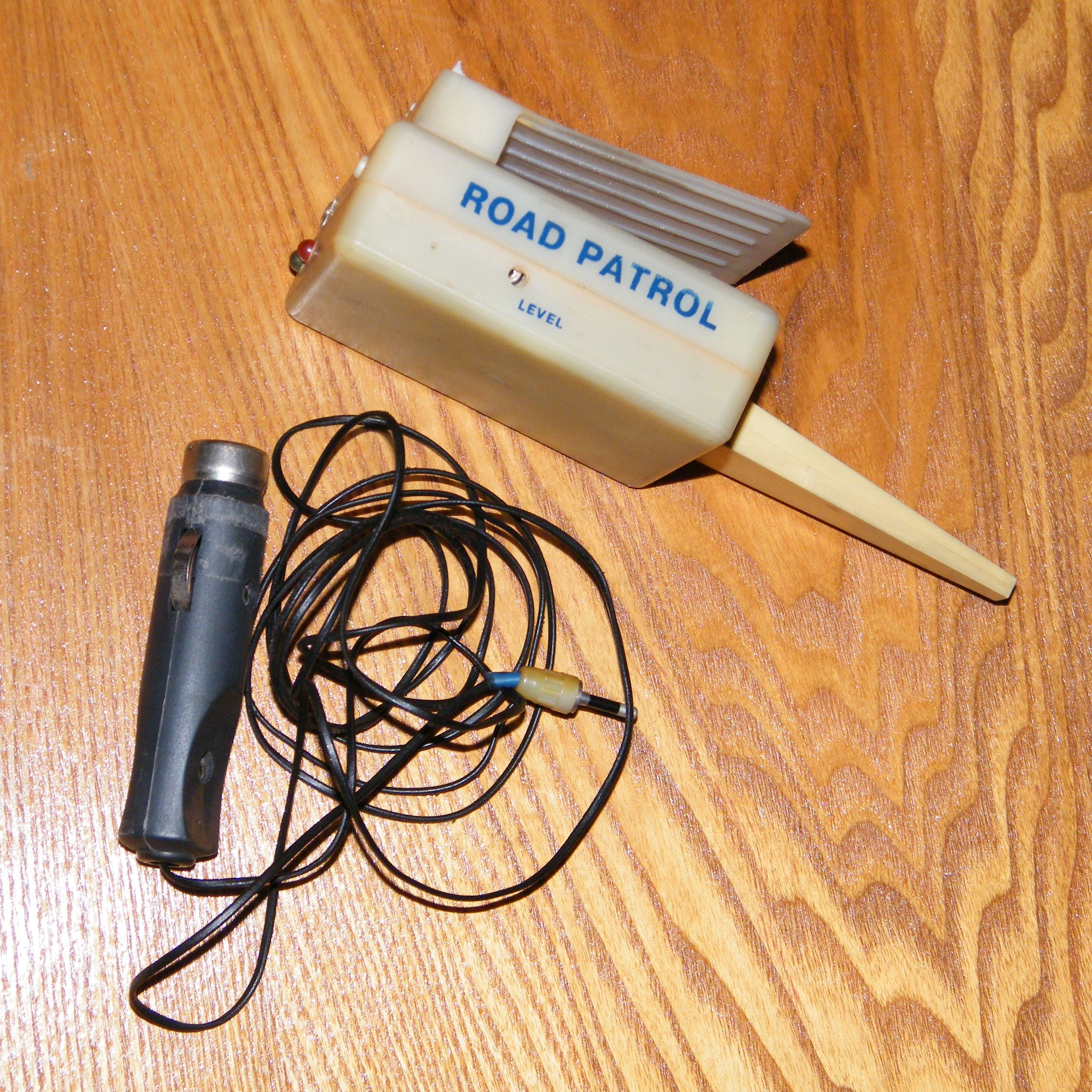 Антирадар (Россия, 1996 год)